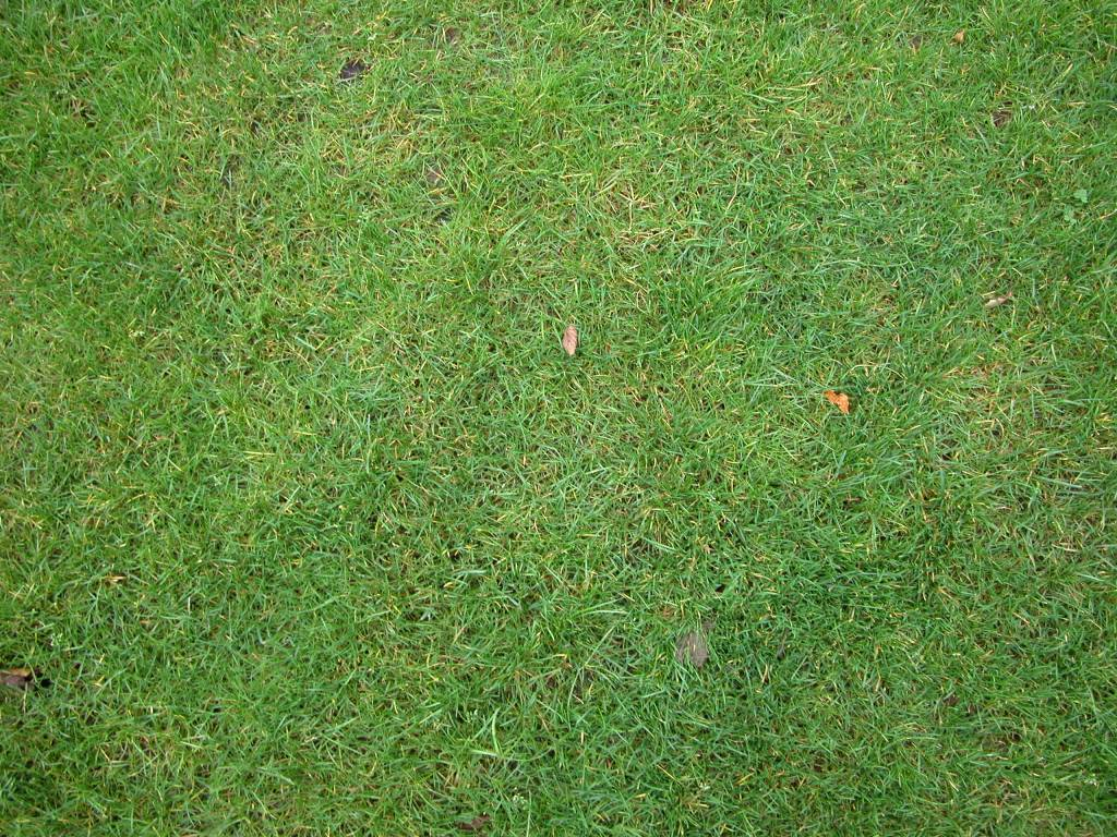 herbe / grass